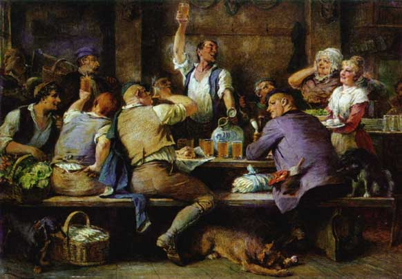 Foto tomada a una reproducción en una sidrería de Frankfurt. El autor original fué j.h. hasselhorst, en 1865, el cuadro es "Äpfelweinstube (significa Pub) ien Sachsenhausen". Sachsenhausen es un barrio deFrankfurt. 25 de enero de 2011 a la(s) 20:39 · Me gusta